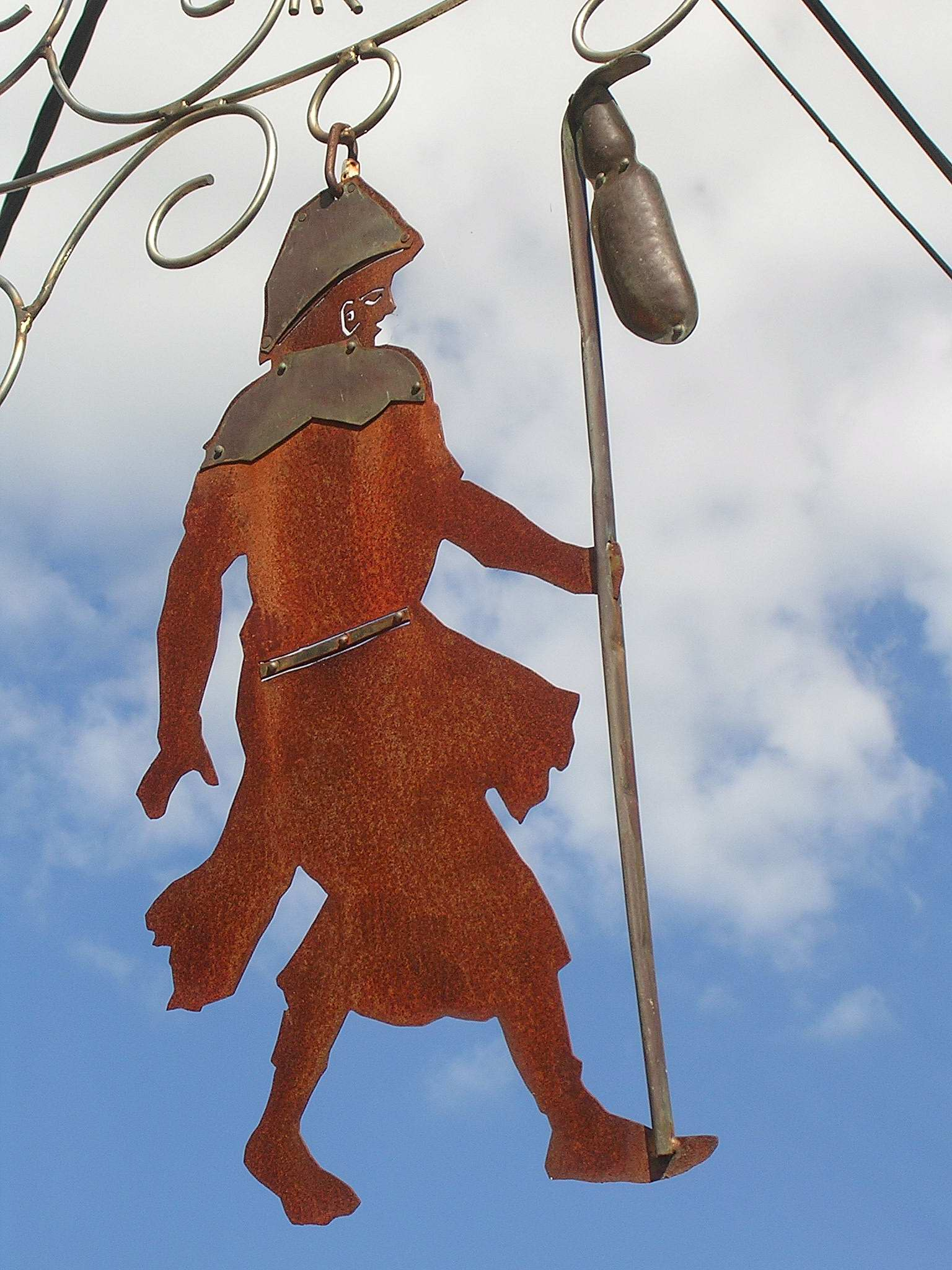 Enseigne de la société landaise des amis de Saint-Jacques, rue Lesbazeilles, à Mont-de-Marsan